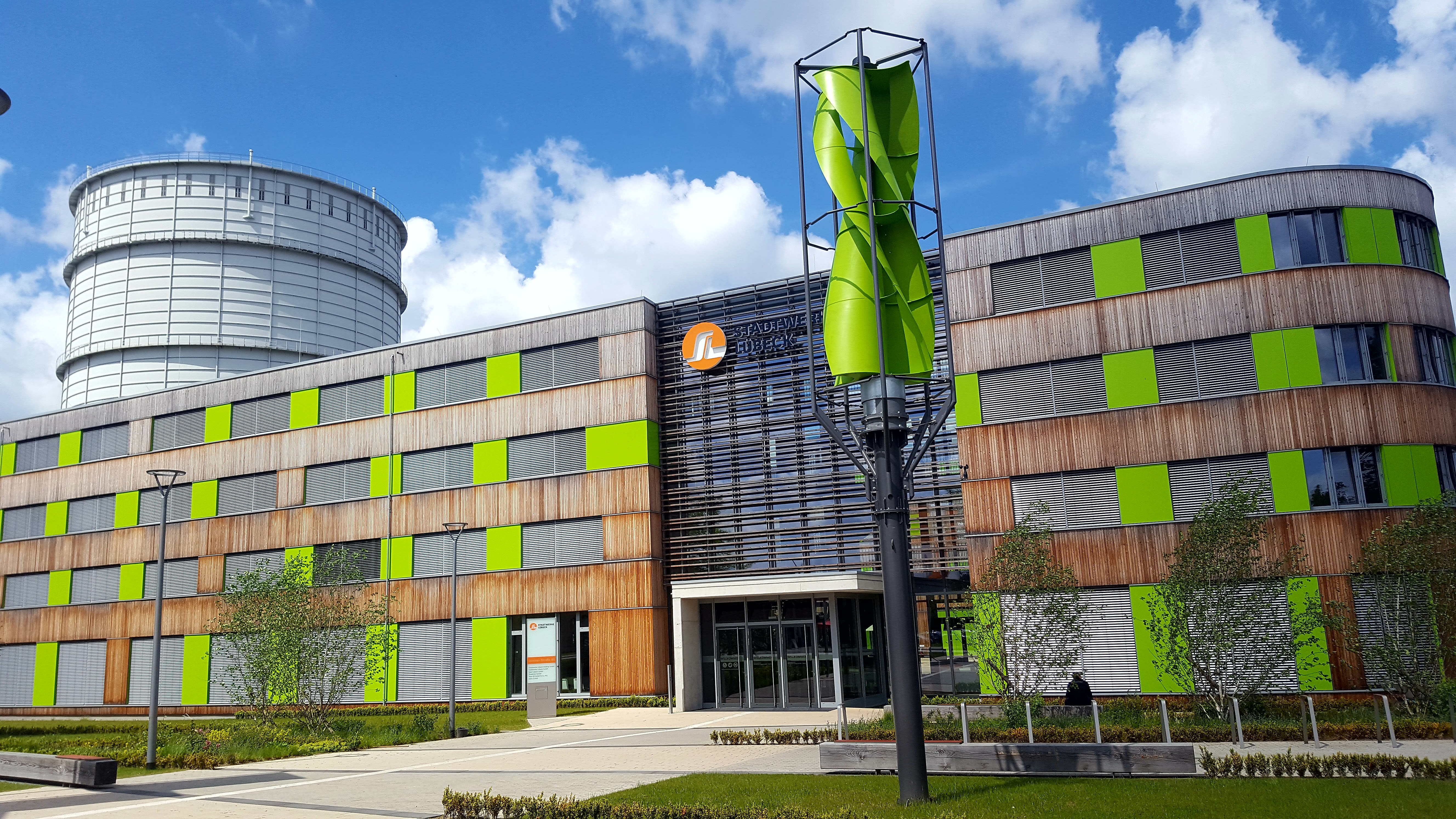 Das Gebäude der Stadtwerke Lübeck GmbH in der Geniner Straße 80, 23560 Lübeck. Im Hintergrund das Gasometer in Lübeck